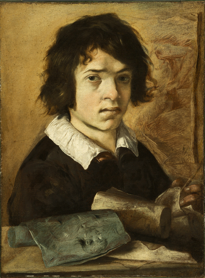 Ritratto di ragazzo con fogli disegnati